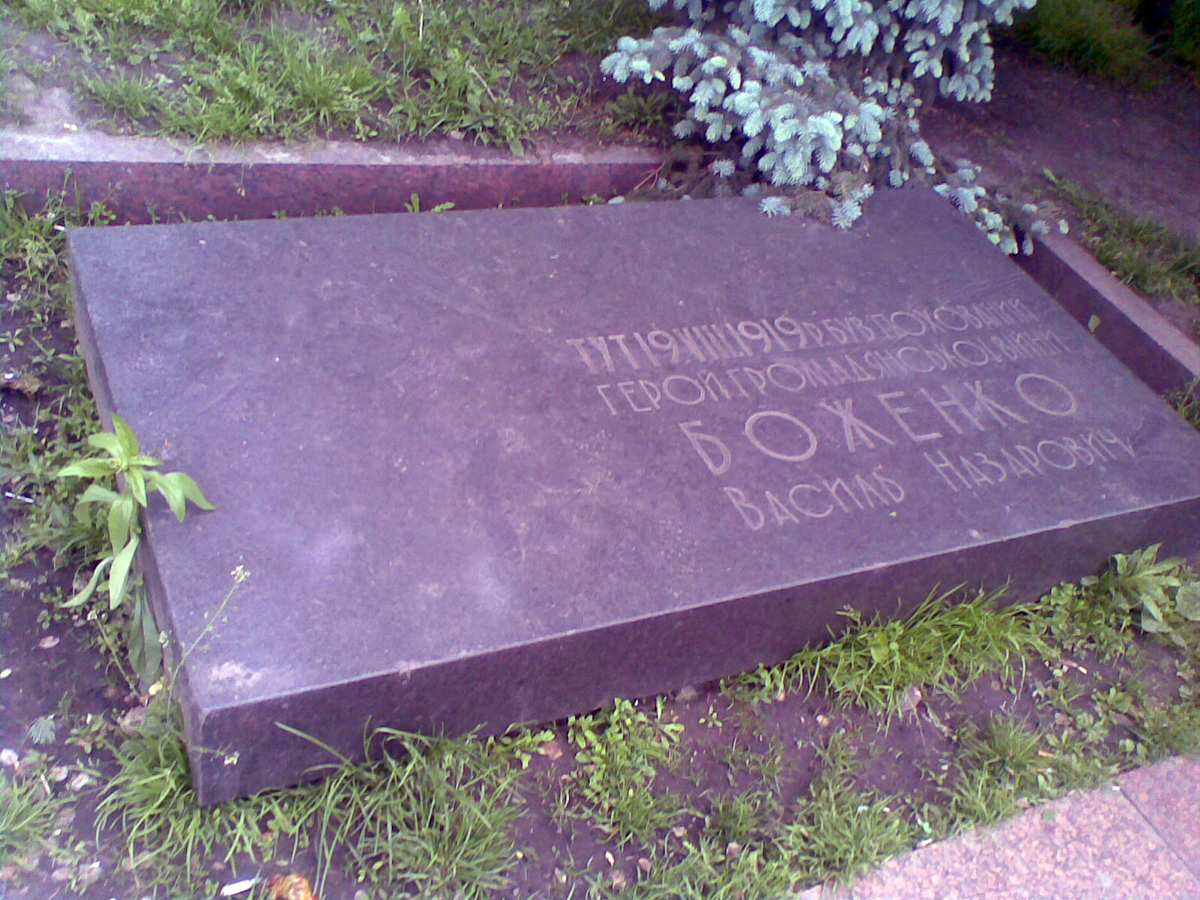 Надгробная плита. Житомир